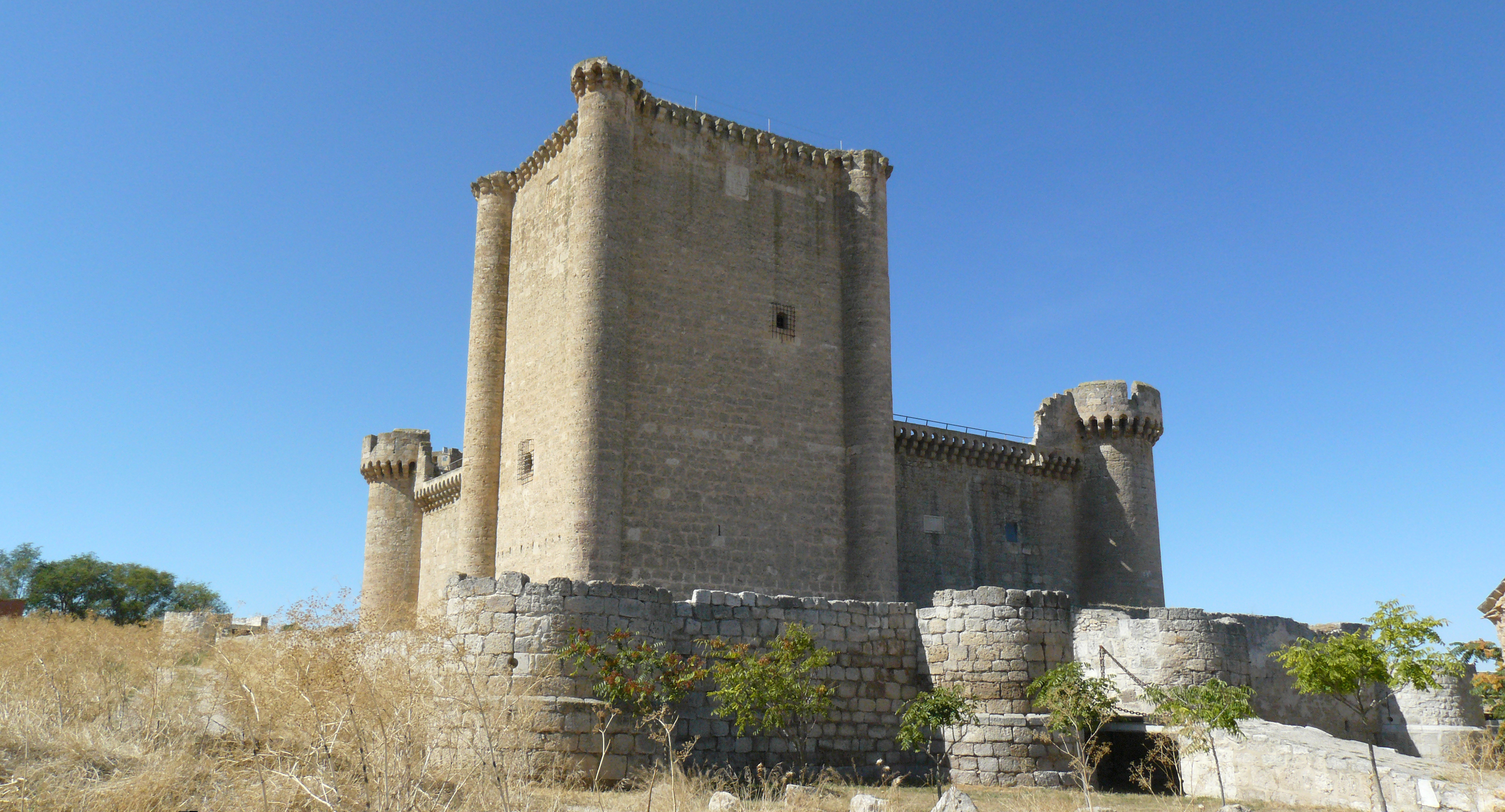 Villafuerte de Esgueva, Burgos.